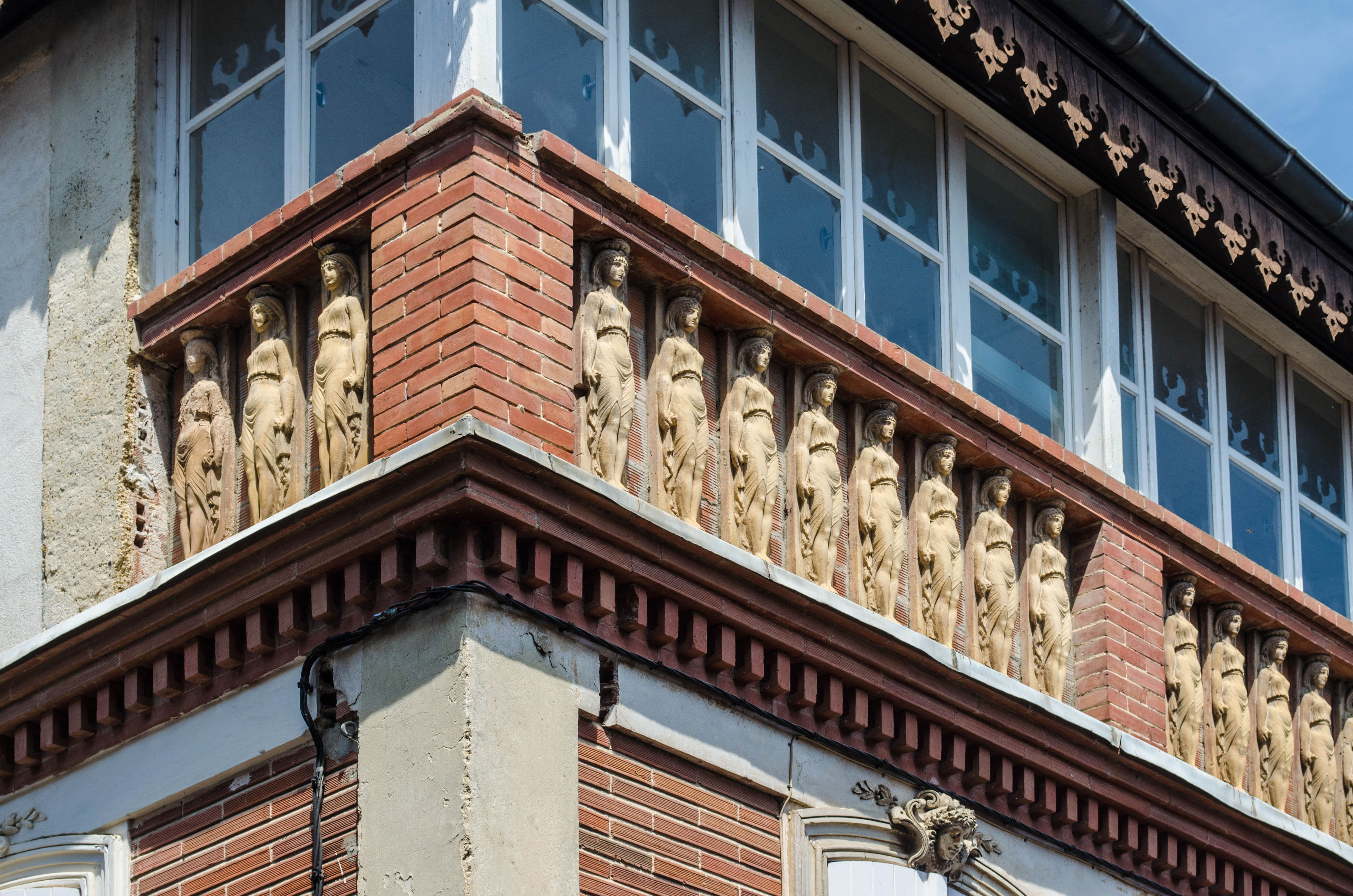 Maison des Cariatides (XIXe s.), à Lectoure (Gers, Midi-Pyrénées, France). Détail de la balustrade